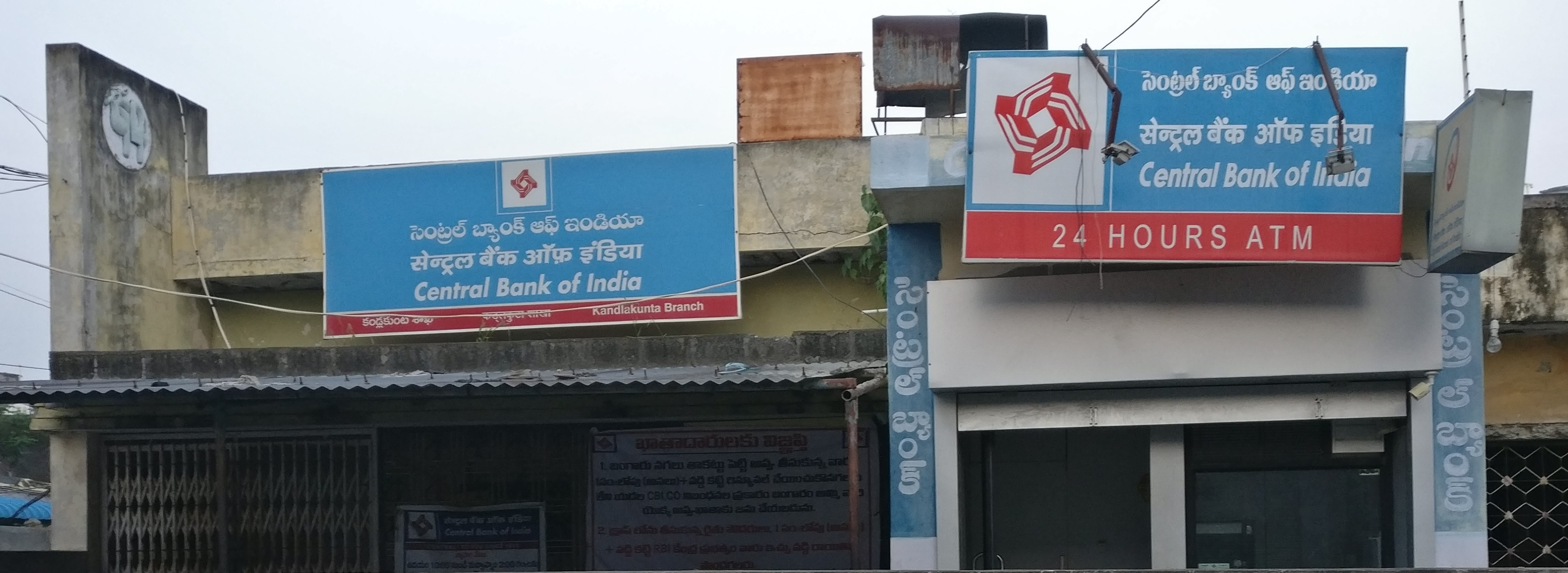 సెంట్రల్ బ్యాంక్ ఆఫ్ ఇండియా:- కండ్లగుంట-చాగల్లు రహదారి మీద పాలకేంద్రం బిల్డింగ్ లో, సెంట్రల్ బ్యాంక్ ఆఫ్ ఇండియ శాఖా కార్యాలయాన్ని 1989, ఫిబ్రవరి-10వ తేదీనాడు కోడెల శివప్రసాదరావు, A.P.V.N శర్మ గార్ల చేతుల మీదుగా ప్రారంభించిబడింది. గ్రామీణ ప్రాంతాలలోని బడుగులకు చేయూతనిచ్చేలా ఉండాలనే ఉద్దేశంతో ఈ బ్యాంకు స్థాపించడం జరిగింది. ఈ బ్యాంకు ద్వారా అన్నిరకాల లోన్స్ ఇవ్వబడుచున్నవి. చుట్టుప్రక్కల గ్రామీణ రైతులకు పంట రుణాలు మరియు ఇతర రుణాలకు ఎంతో ఉపయోగకరంగా ఉంది. పంట భూములు తాకట్టు పెట్టి మరియు బంగారం తాకట్టు పెట్టి రుణాలు పొందుటకు రైతులకు సౌకర్యం ఉంది. బ్యాంకు అంతర్జాలంతో అనుసంధానించబడింది. గ్రామంలో ATM సౌకర్యం ఉంది.